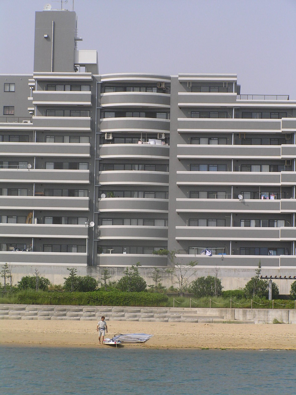 海辺のマンション